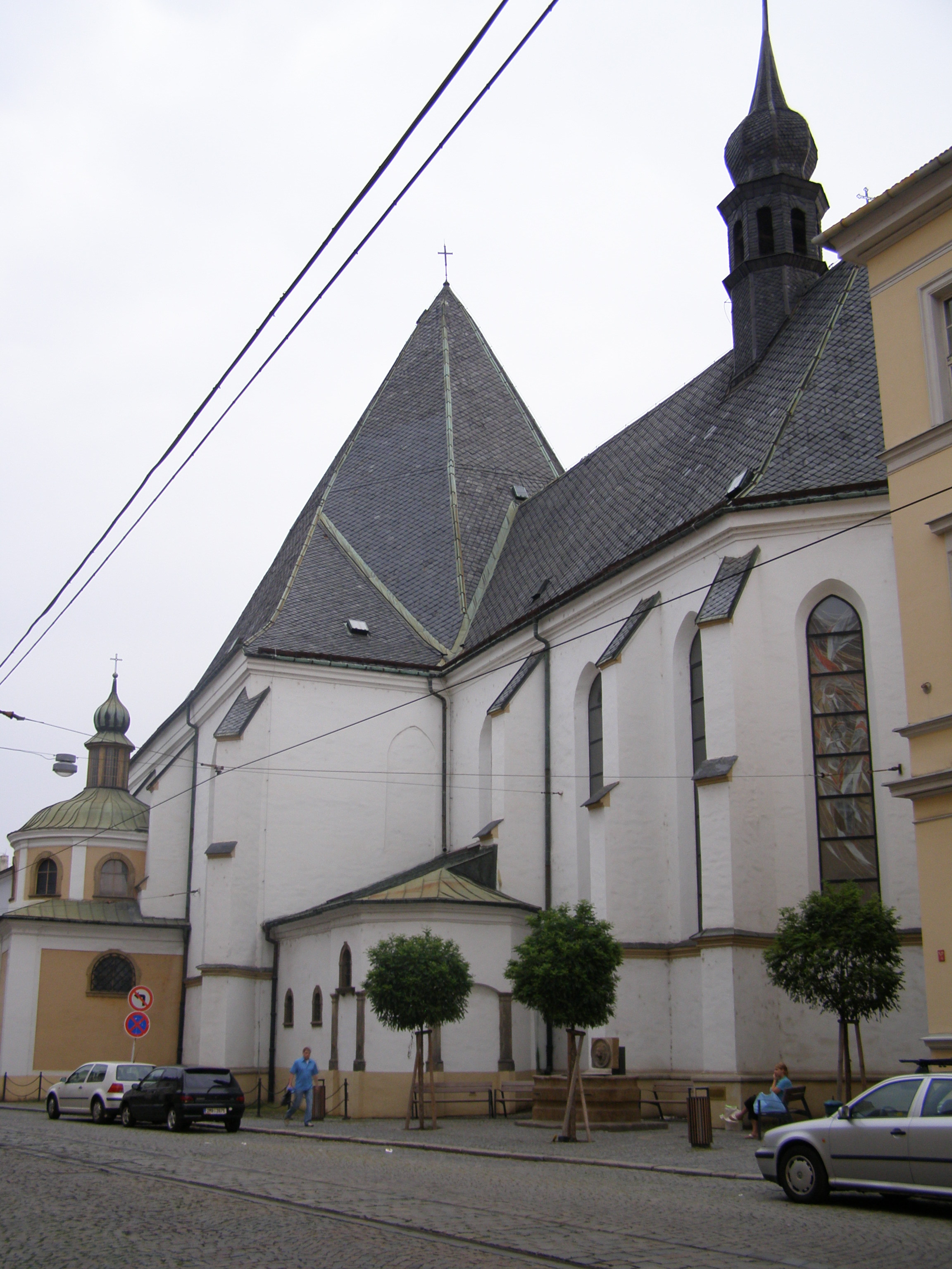 Kostel Neposkvrněného početí Panny Marie v Olomouci